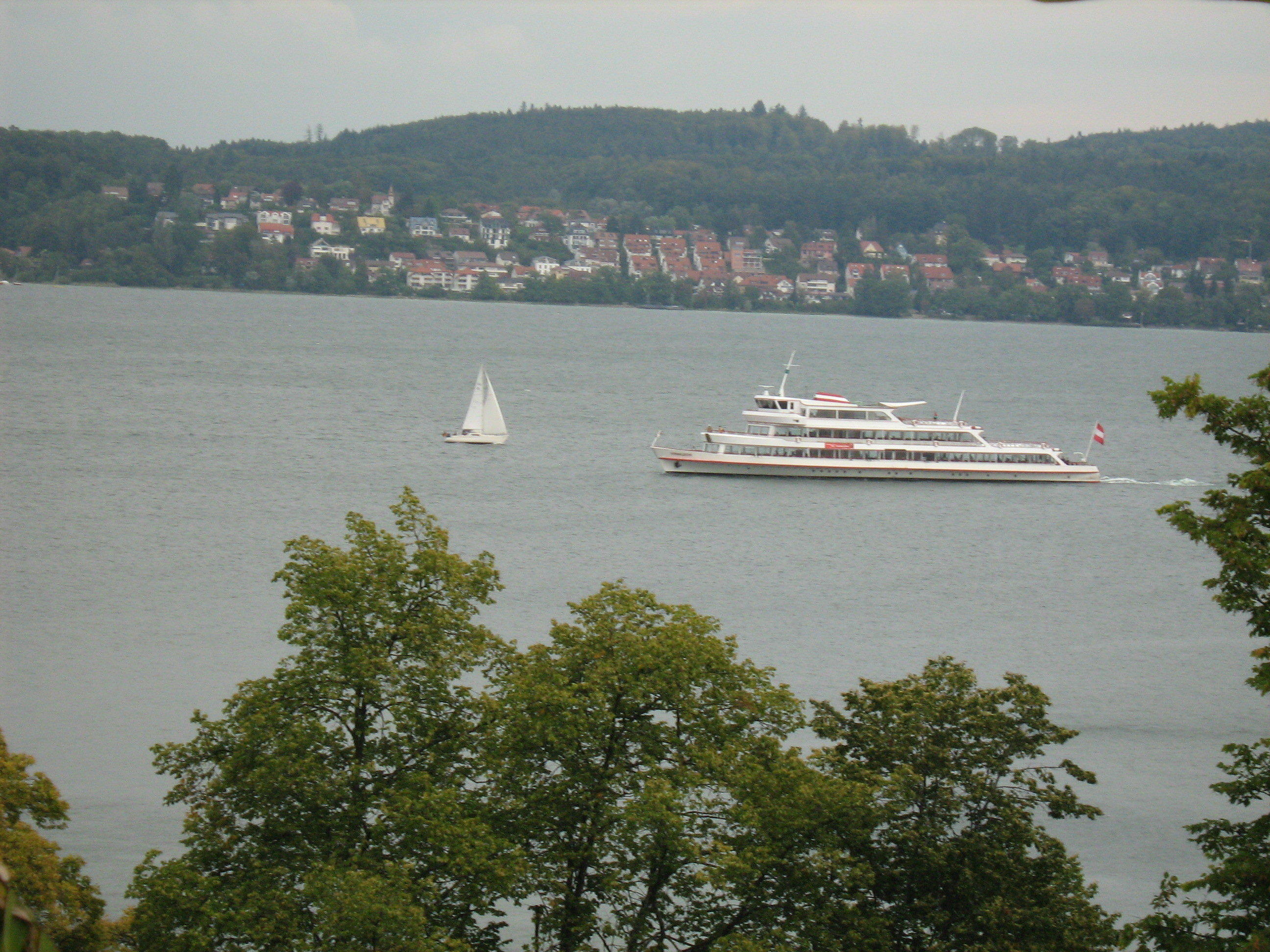 Bodensee mit Schiff 2007